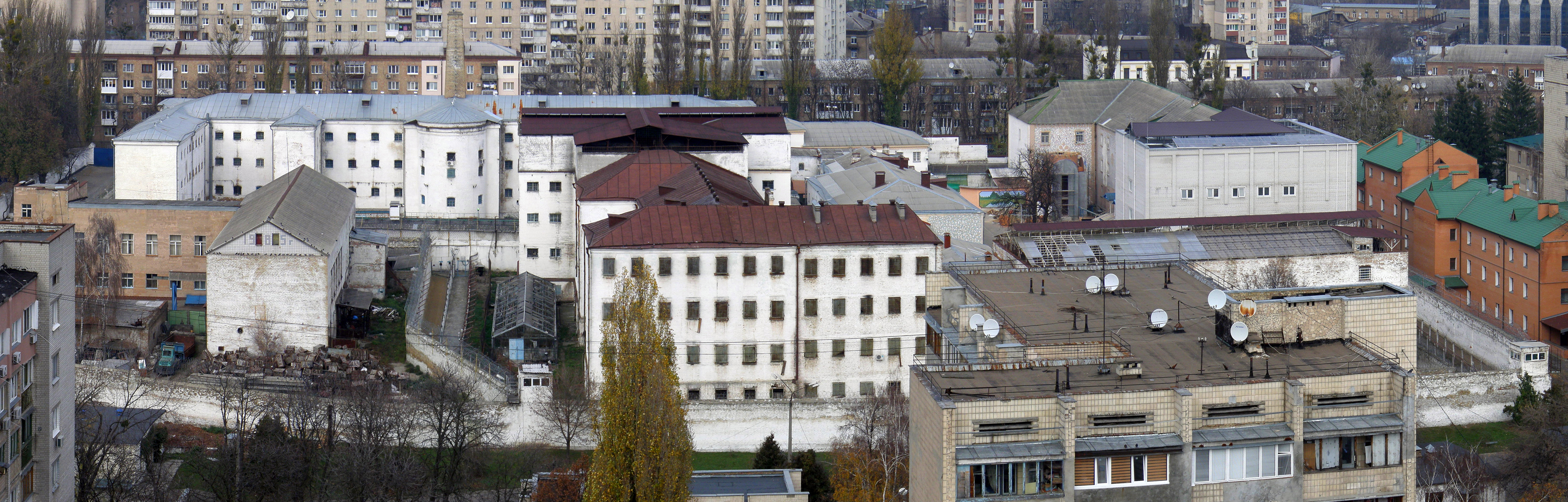 Лукьяновский СИЗО